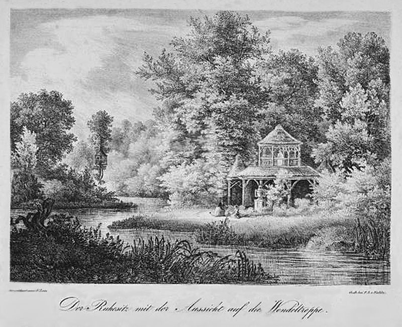 Lithographie vom Schlosspark Lützschena: Blick auf den Pavillon "Ruhesitz" und die "Wendeltreppe" im Hintergrund